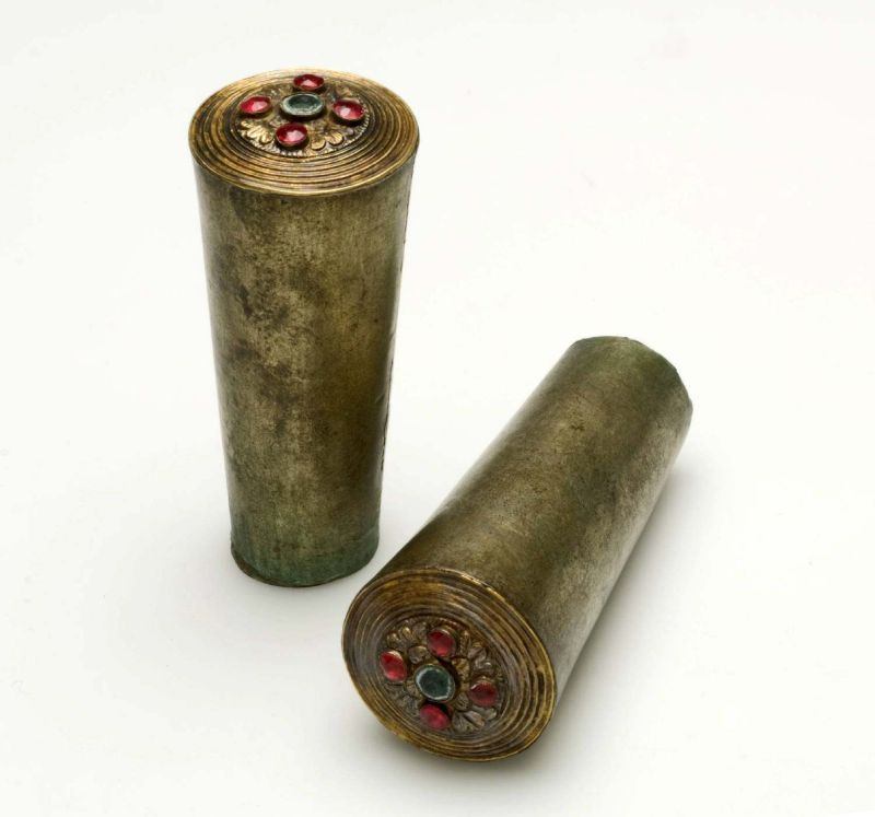 Oorsieraad. Een paar zilveren oorsieraden Unknown language: Subeng